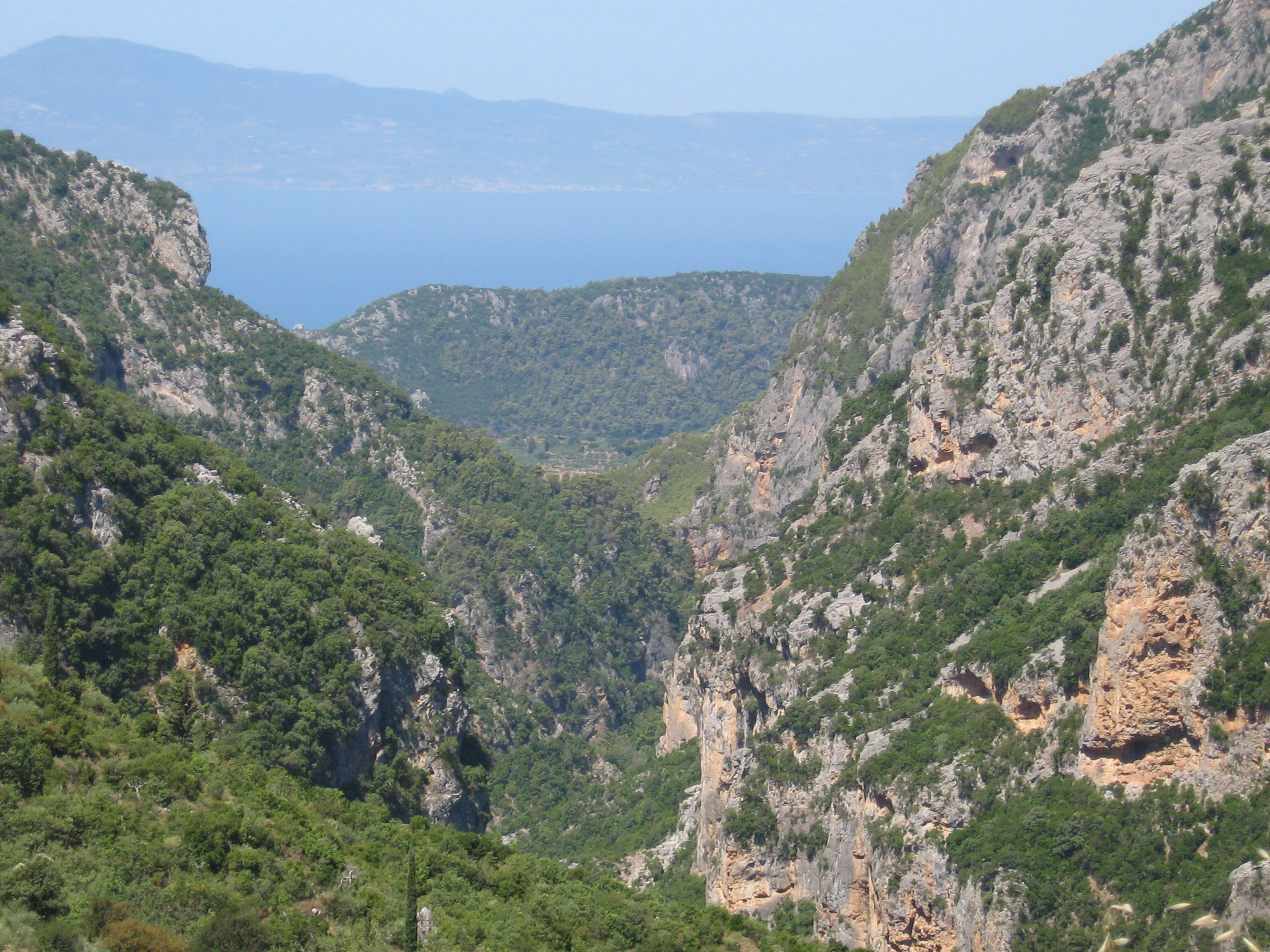 ΜΕΣΣΗΝΙΑΚΗ ΜΑΝΗ (By Lily)